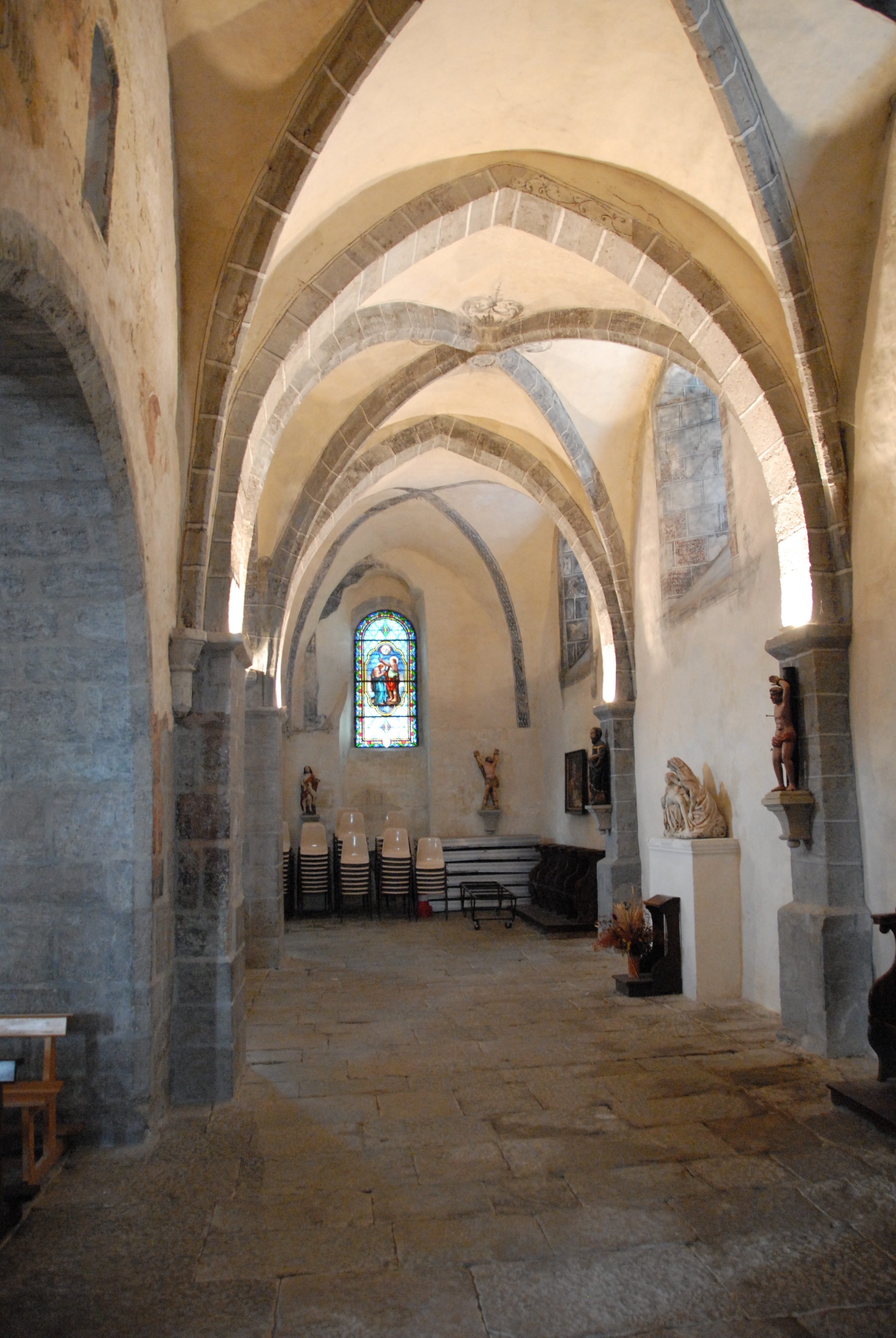 Abteikirche St.-André Lavaudieu, Seitenschiff nach Westen